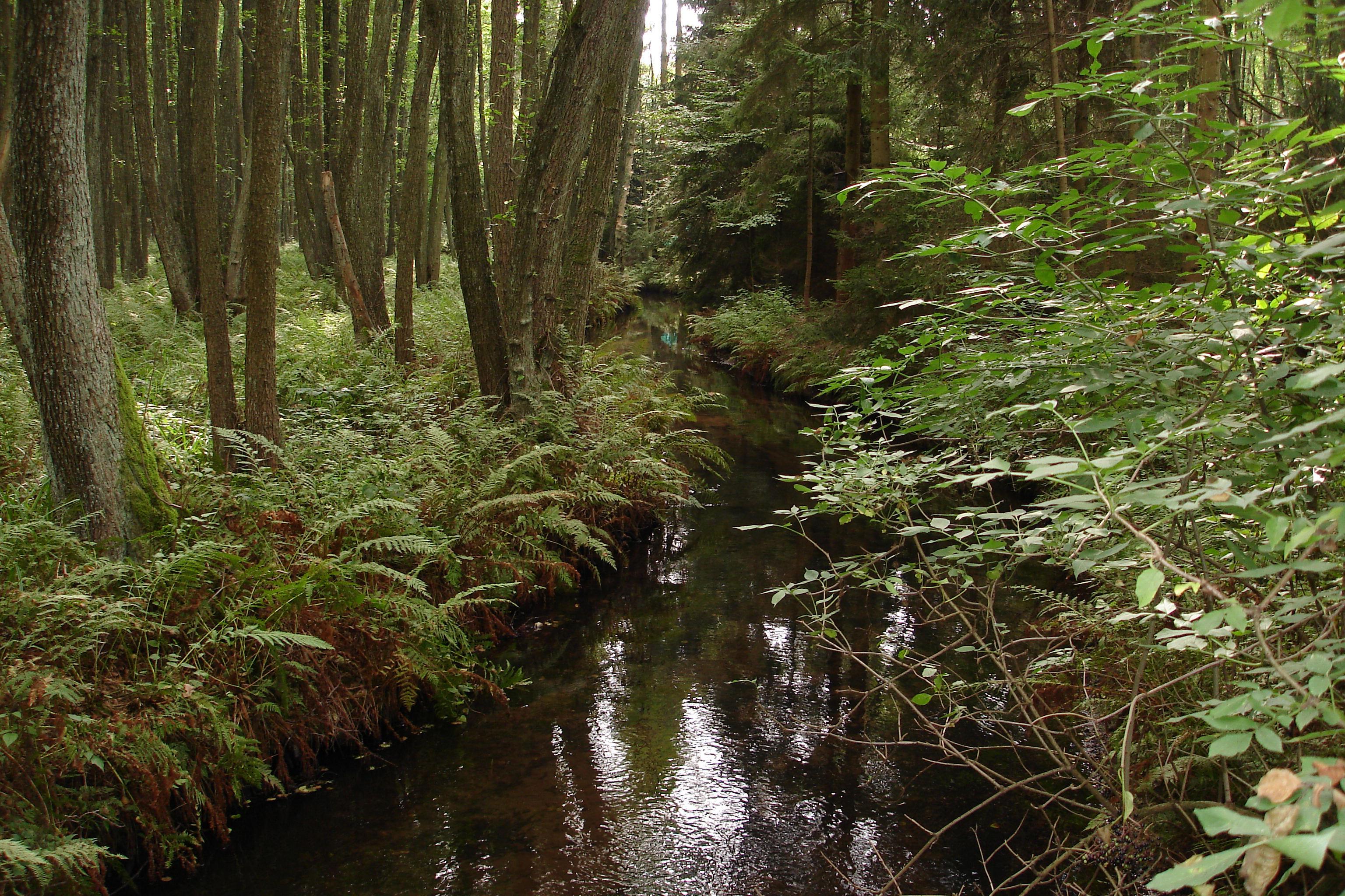 Unberührtes Waldstück im sonst durch weitläufige Wiesen und Felder geprägten NSG Schweinebruch zwischen Celle und Beedenbostel. Farn säumt den sumpfigen Waldboden durch den sich der Alvernsche Bach schlängelt.